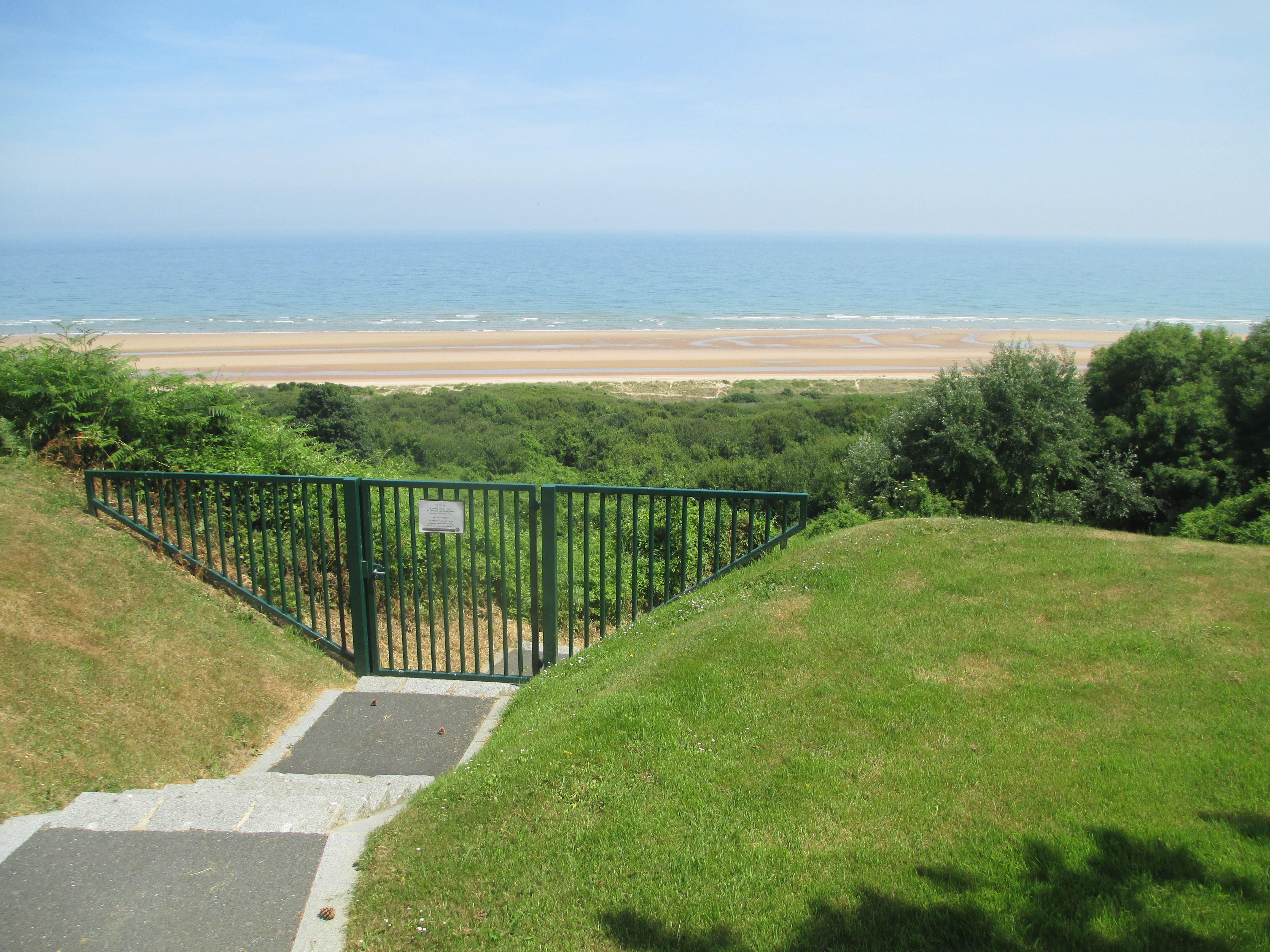 חוף אומהה מבית הקברות האמריקאי הצבאי בנורמנדי